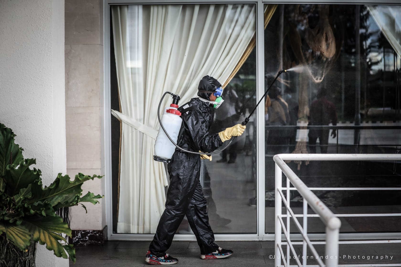 Präventionsmaßnahmen am Präsidentenpalast Osttimors. Tarbosaurus skeletal mounts